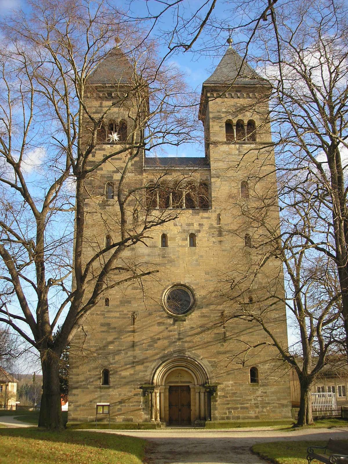 Die Klosterkirche in Bad Klosterlausnitz (Thüringen).